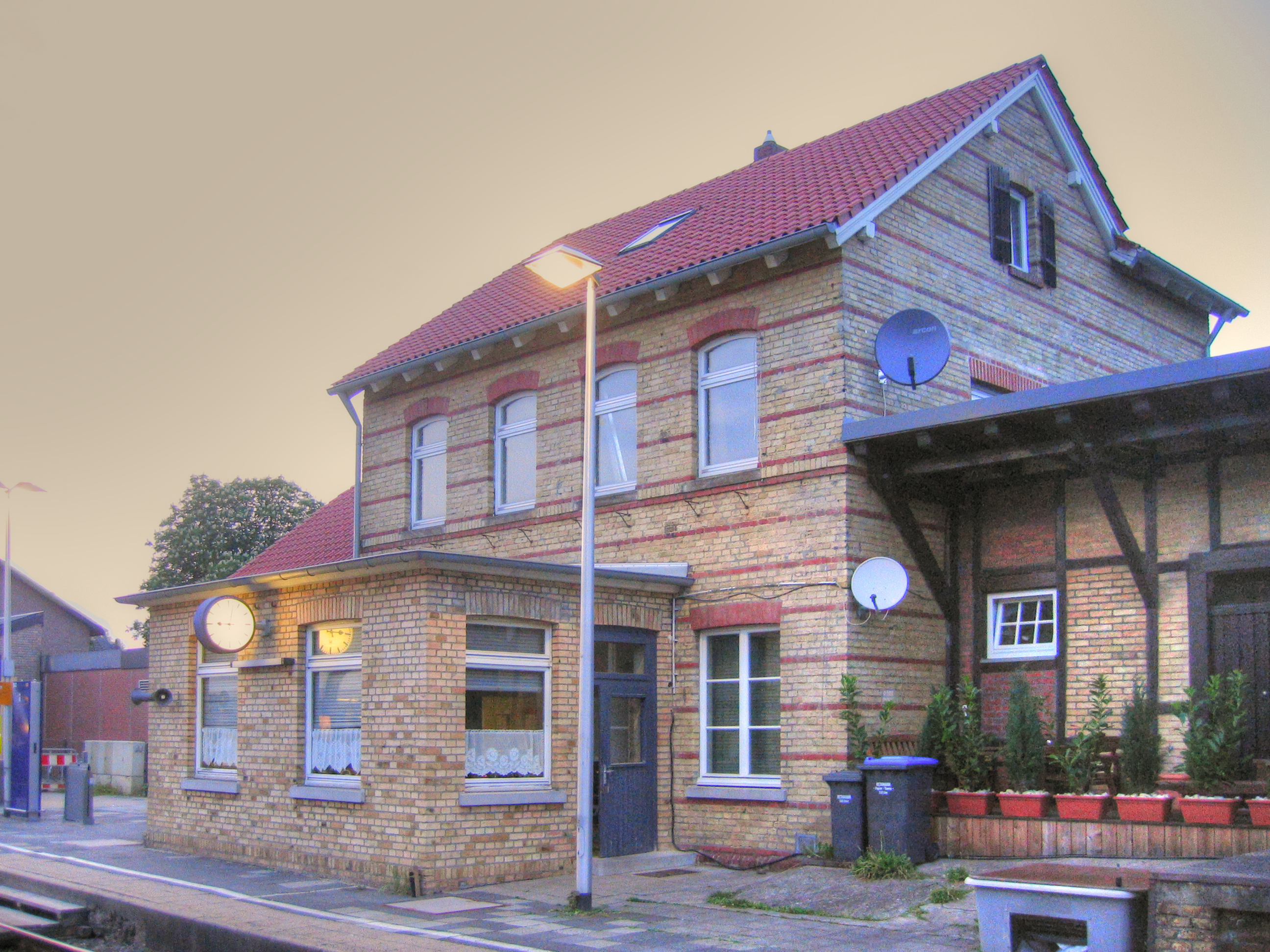 Bahnhof Beelen im Kreis Warendorf